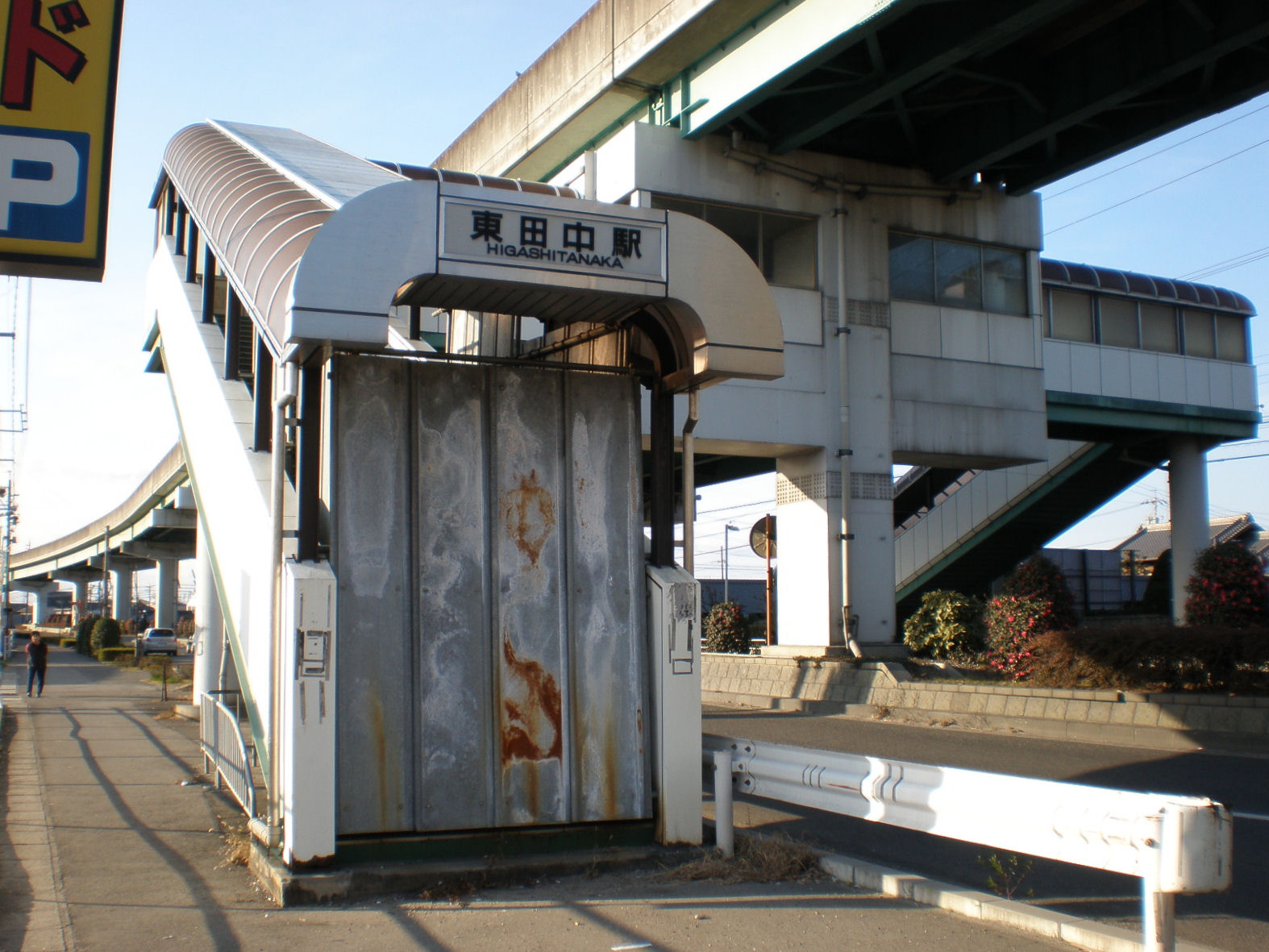 愛知県小牧市の廃駅・東田中駅の南口